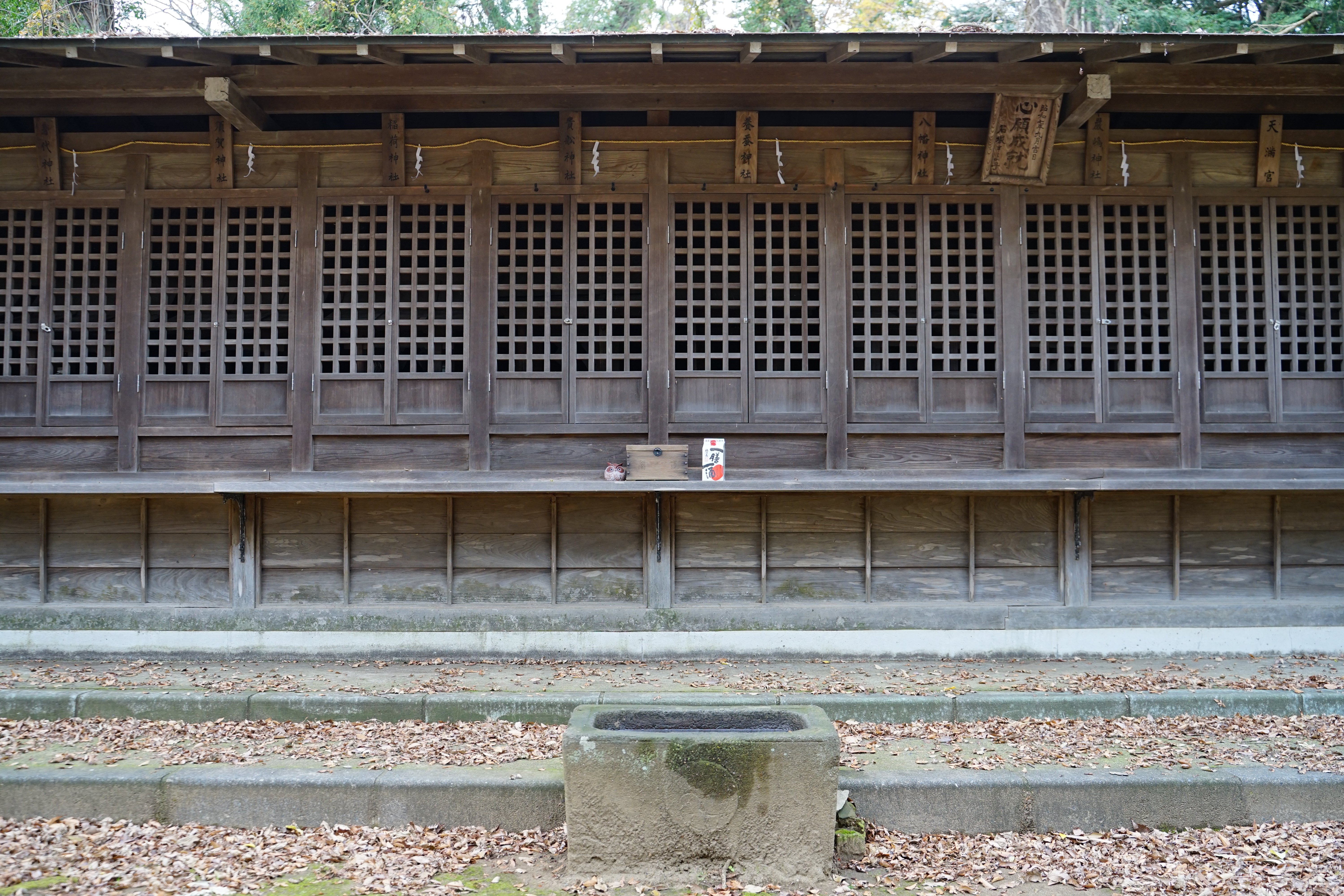 金村別雷神社の合社殿